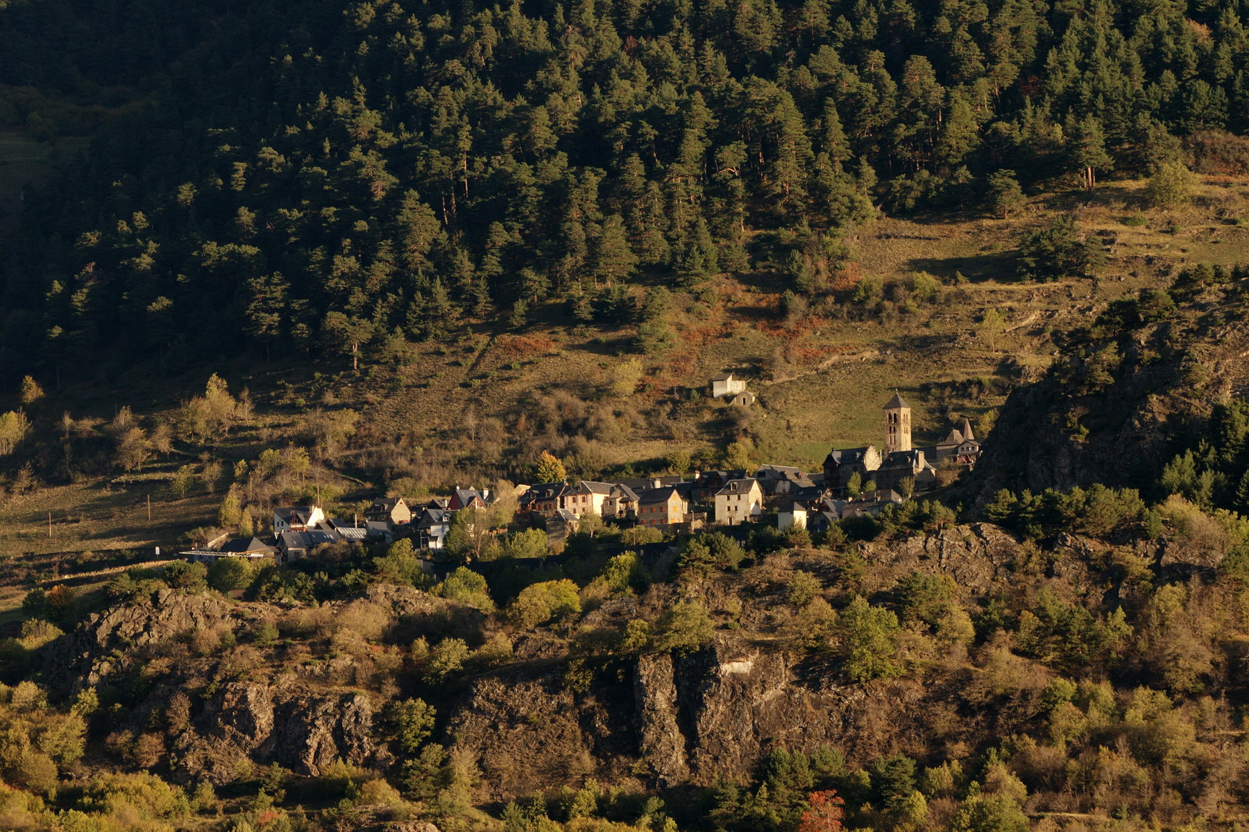 Vila de Vilamòs